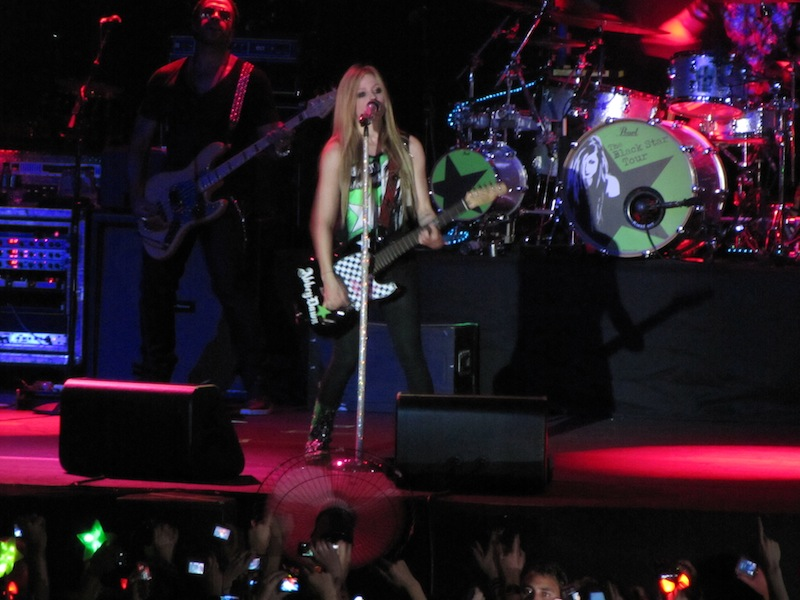 Avril Lavigne em Belo Horizonte, Brasil.